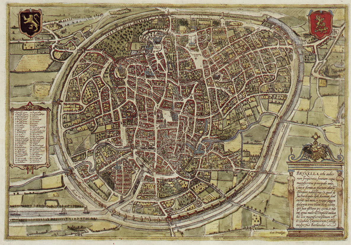 Bruxelles